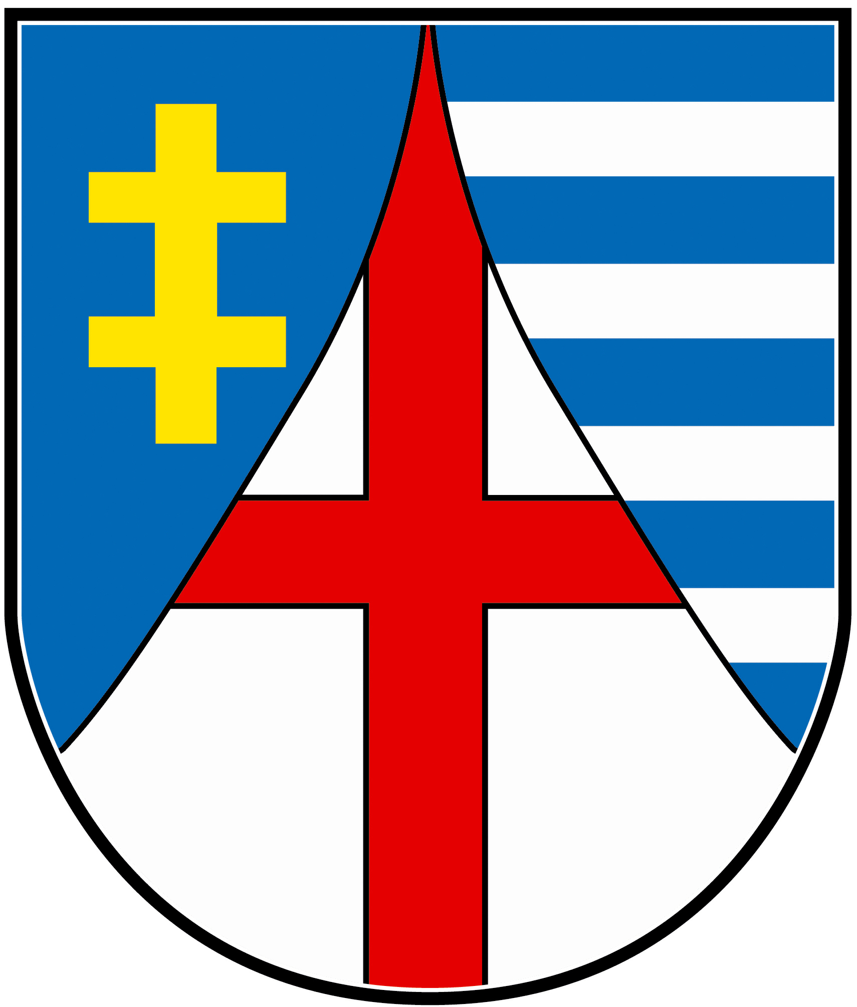 Wappen der Ortsgemeinde Kirf